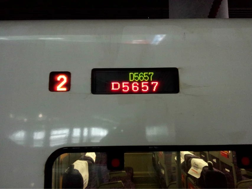 中文（中国大陆）: 合肥南—安庆D5657次电子水牌